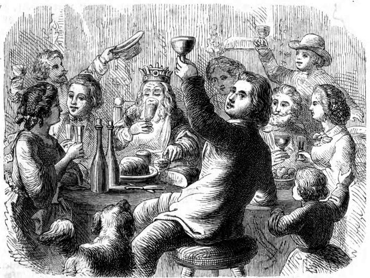 Der König trinkt [Driekoningenfest in Flandern]